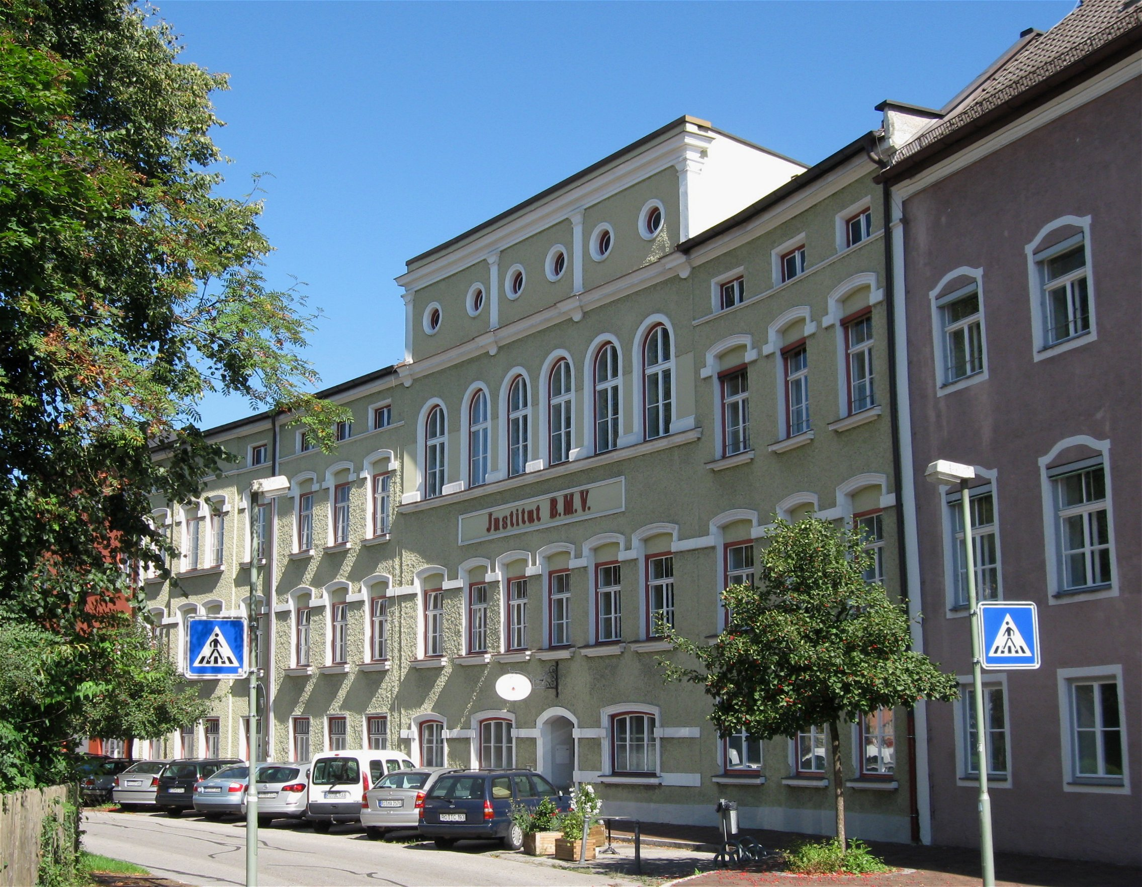 Kaspar-Aiblinger-Platz 4, 6. Ehem. Institut der Englischen Fräulein, langgestreckter dreigeschossiger Bau mit erhöhtem Hauptteil und historisierender Fassadengliederung, im Kern mehrere Gebäude des 16. Jh., ausgebaut und vereinheitlicht 1876 und um 1890; mit Ausstattung; Pavillon, aus Lattenwerk, Jugendstil, Anfang 20. Jh.